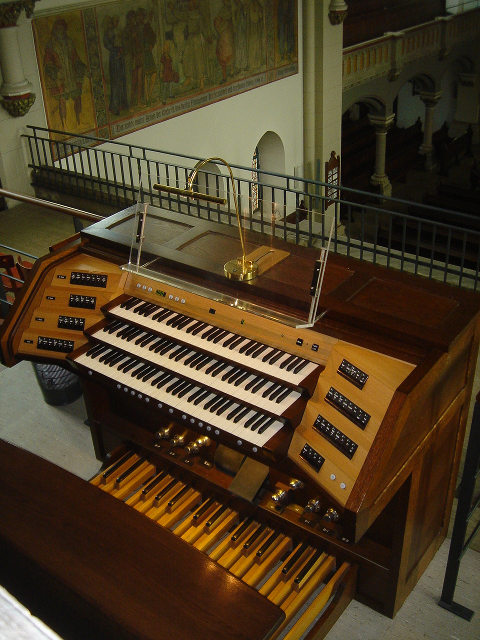 Spieltisch der Orgel in St. Johannis Braunschweig